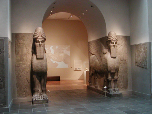 Met Museum - Assyria